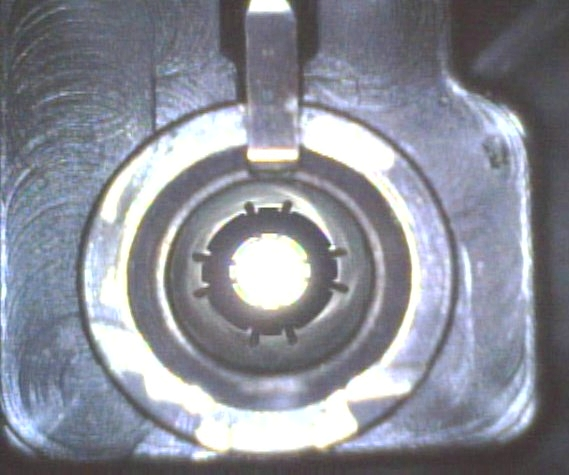 Chambre à cartouche du Fass 57